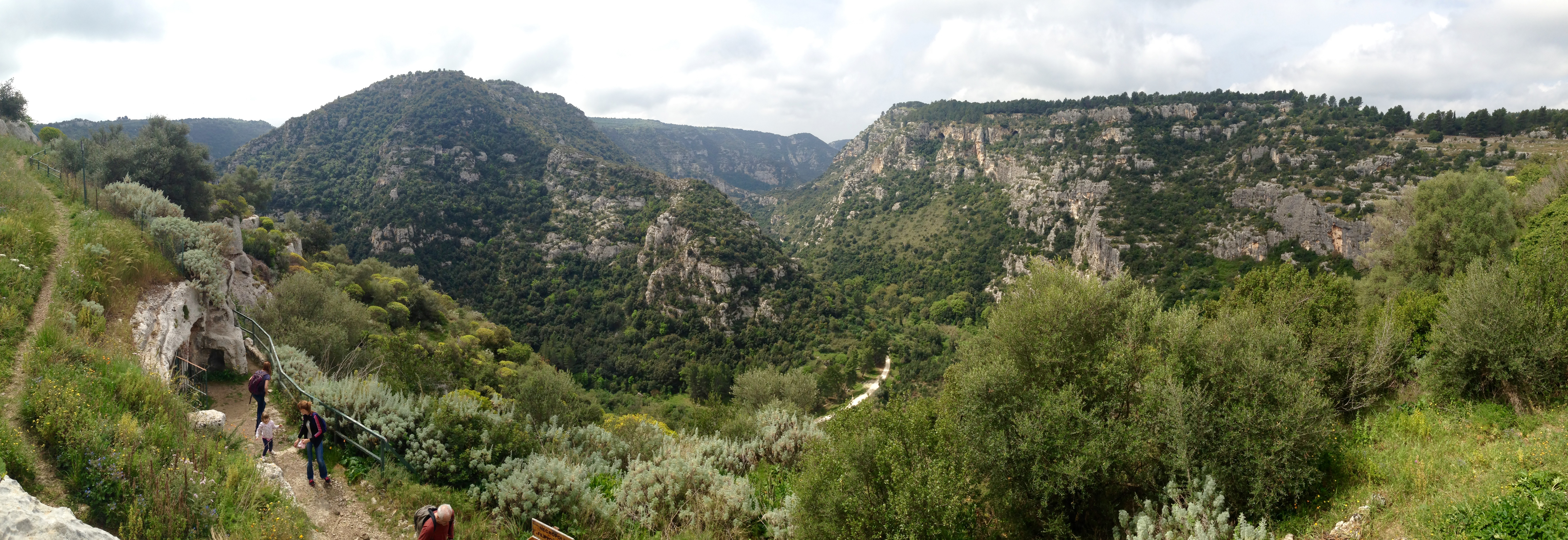 Panorama of Pantalica from San Micidario